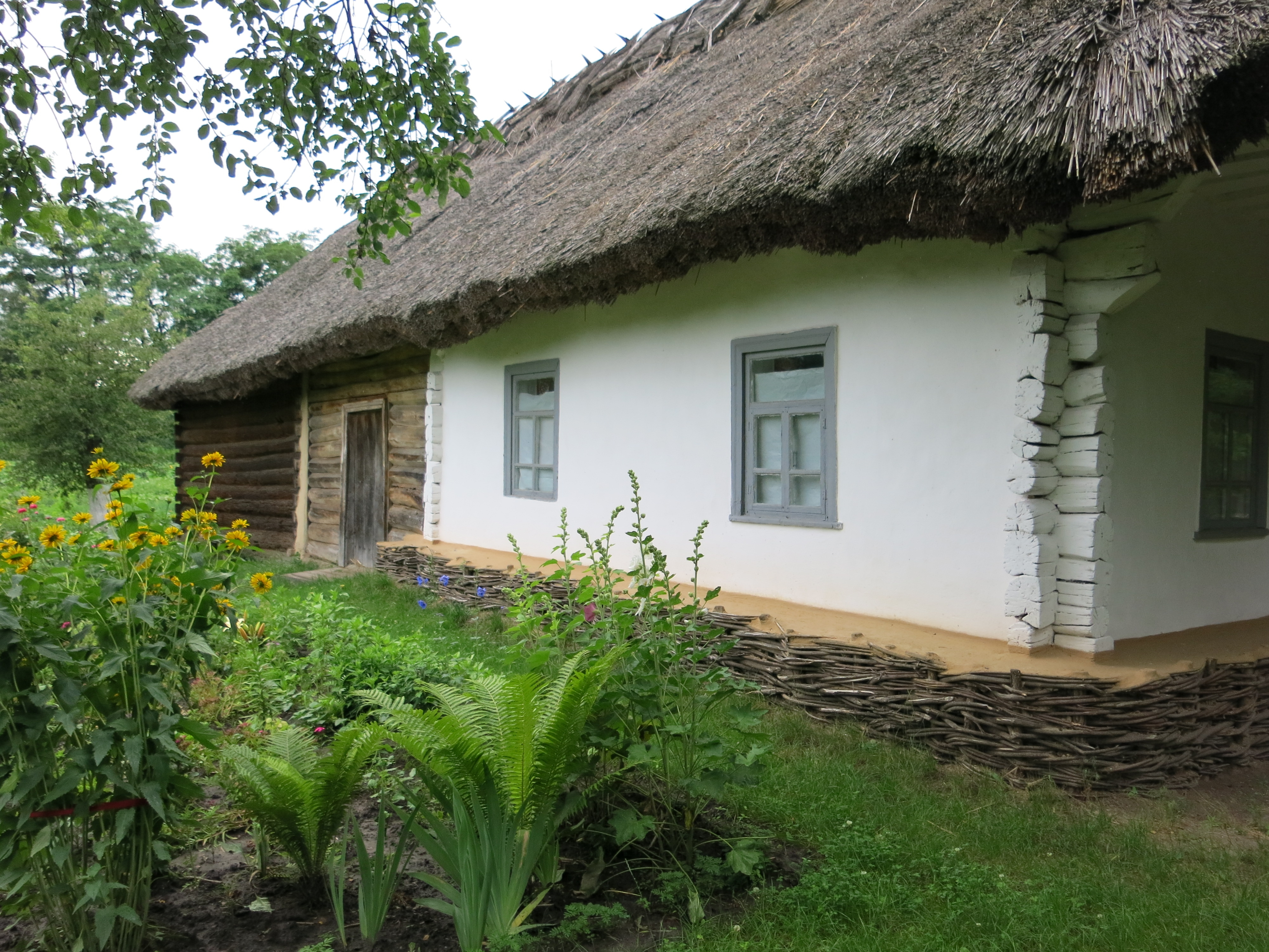 Хата бондаря із с. В'юнище Переяслав-Хмельницького району Київської області, Переяслав-Хмельницький, вул. Літописна, 2